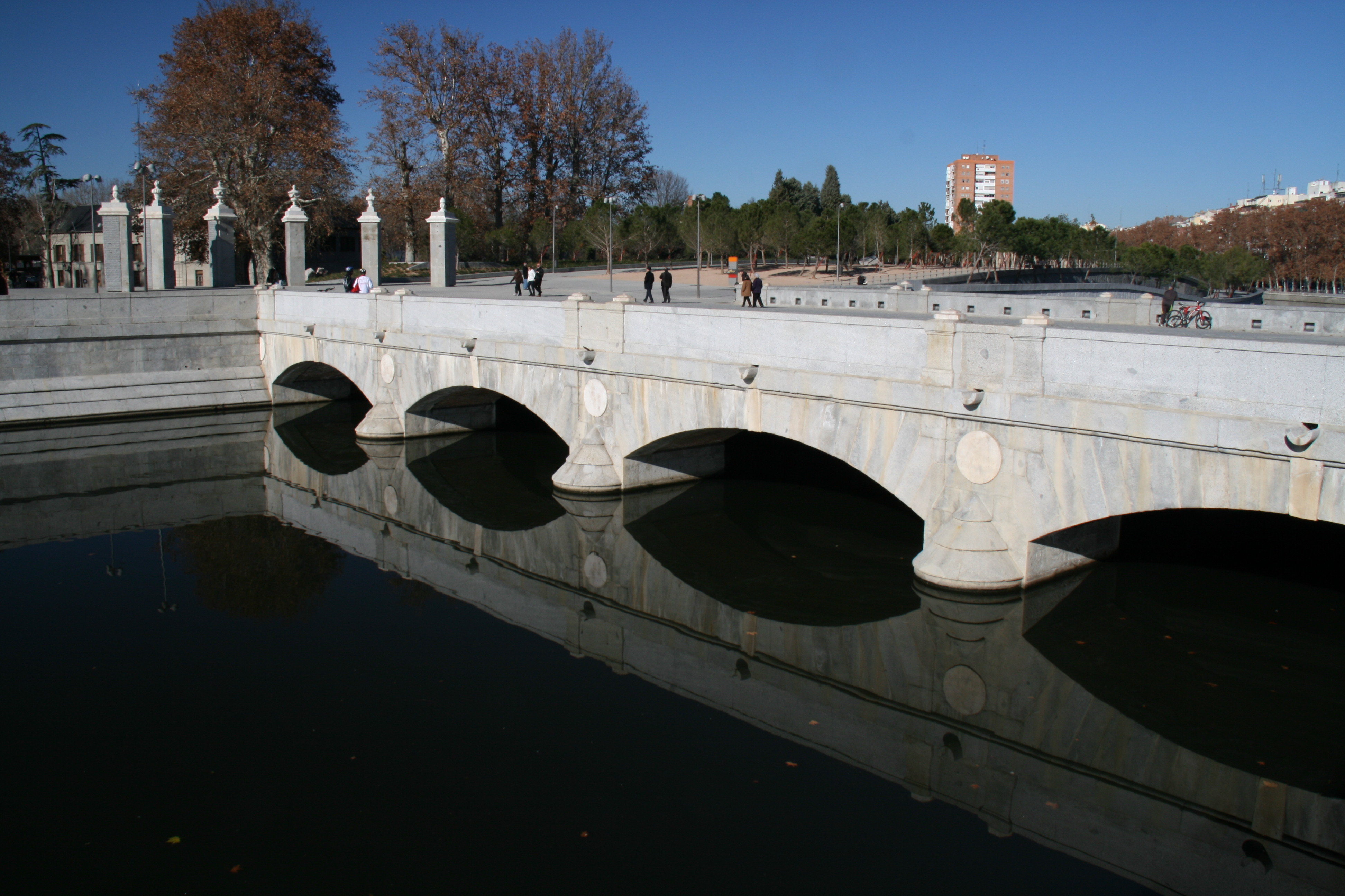 Puente del Rey y su Puerta